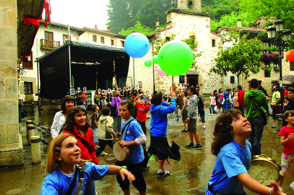 2010eko Aramaioko jaiak.